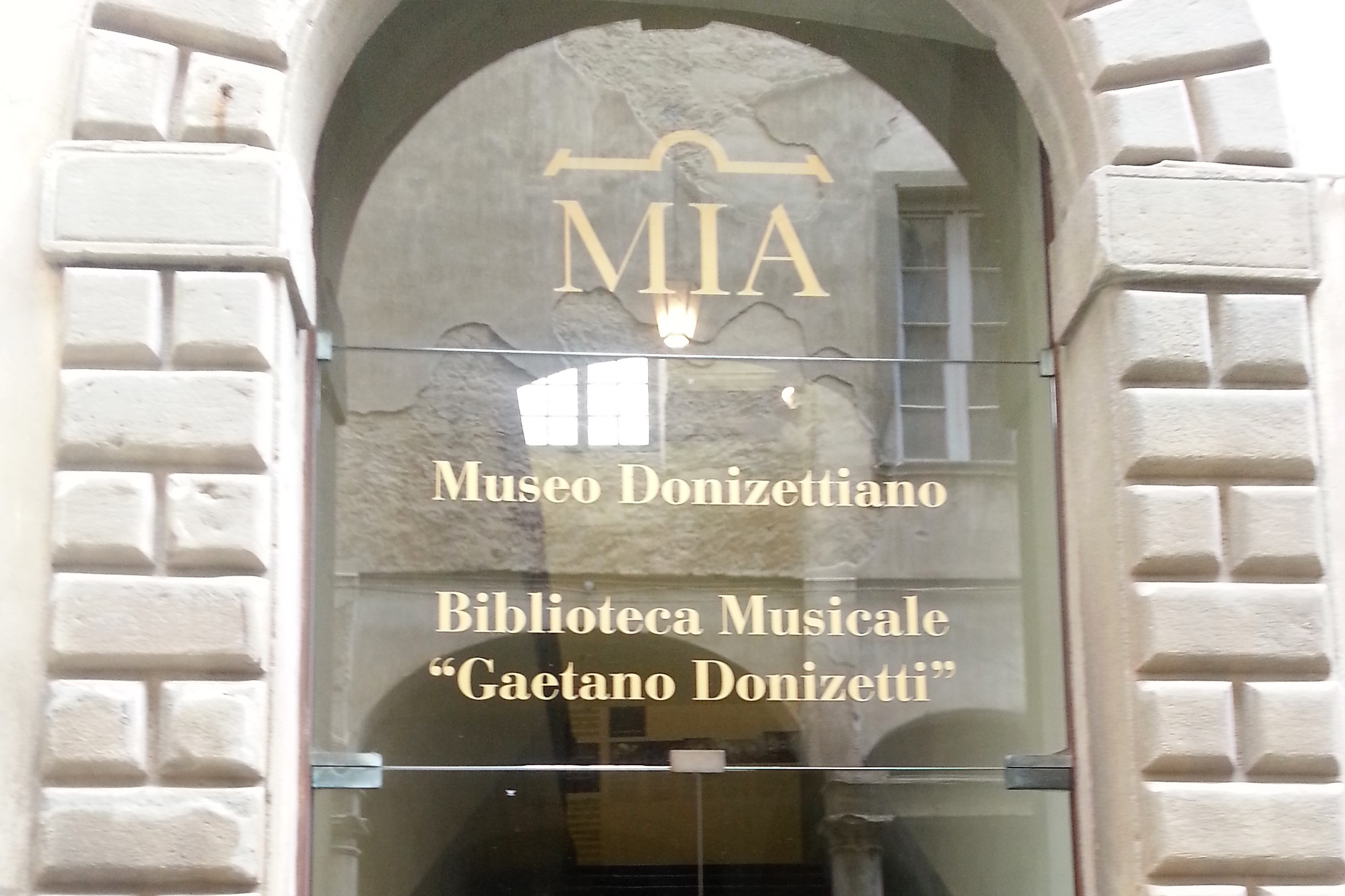 Portale ingresso Fondazione MIA e Museo Donizettiano